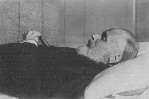 Иван Александрович Гончаров на смертном одре. Петербург. 1891. Литературный музей, Москва.